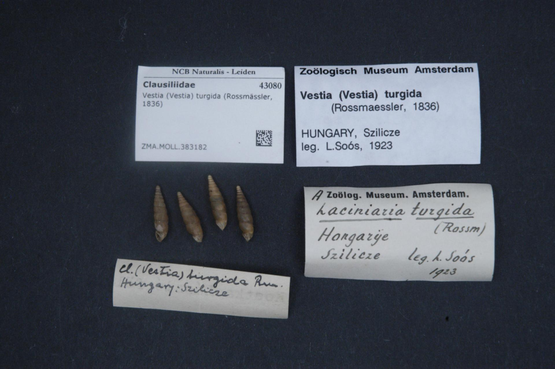 Vestia (Vestia) turgida (Rossmässler, 1836)